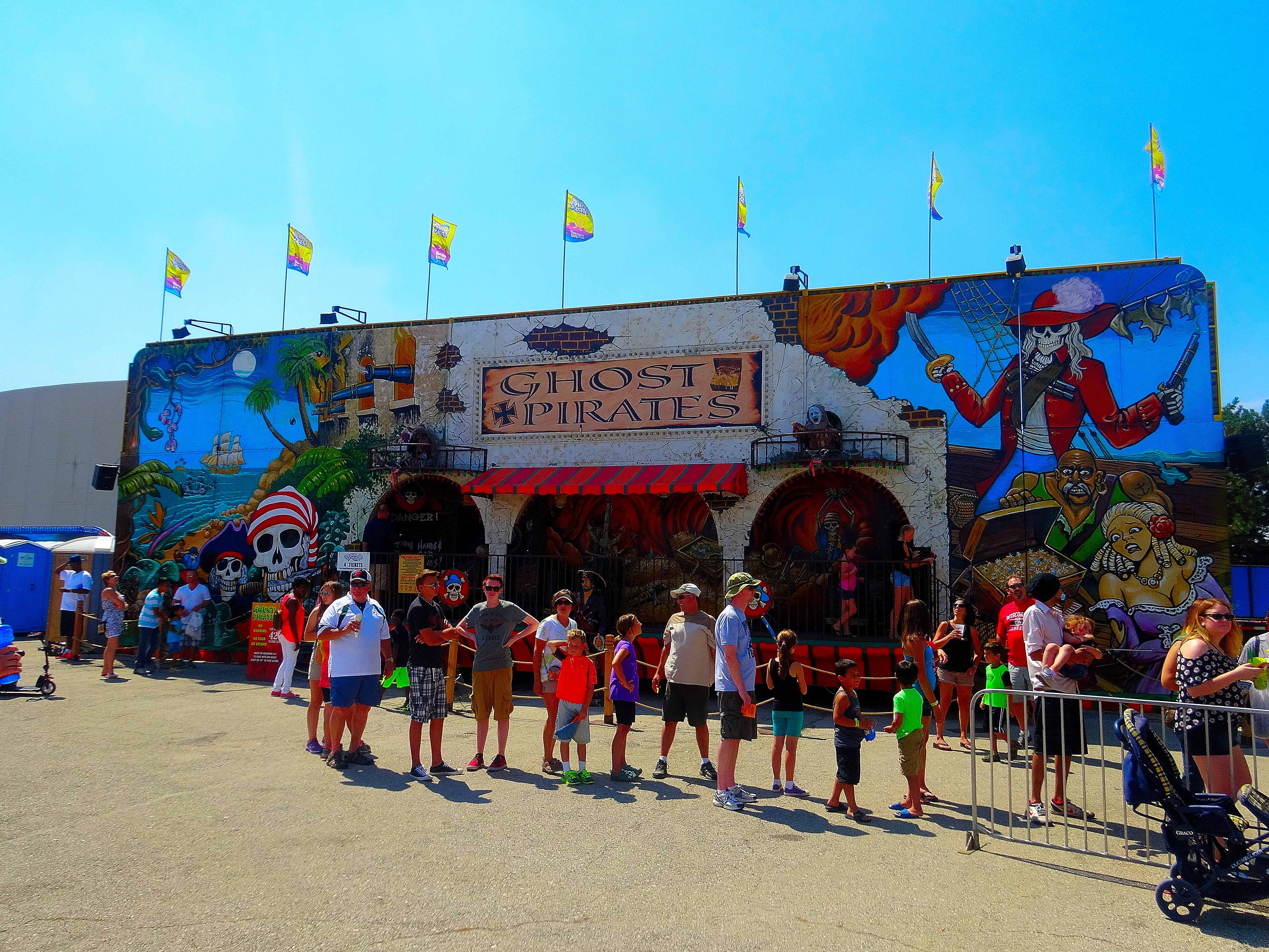 Ghost Pirate Dark Ride